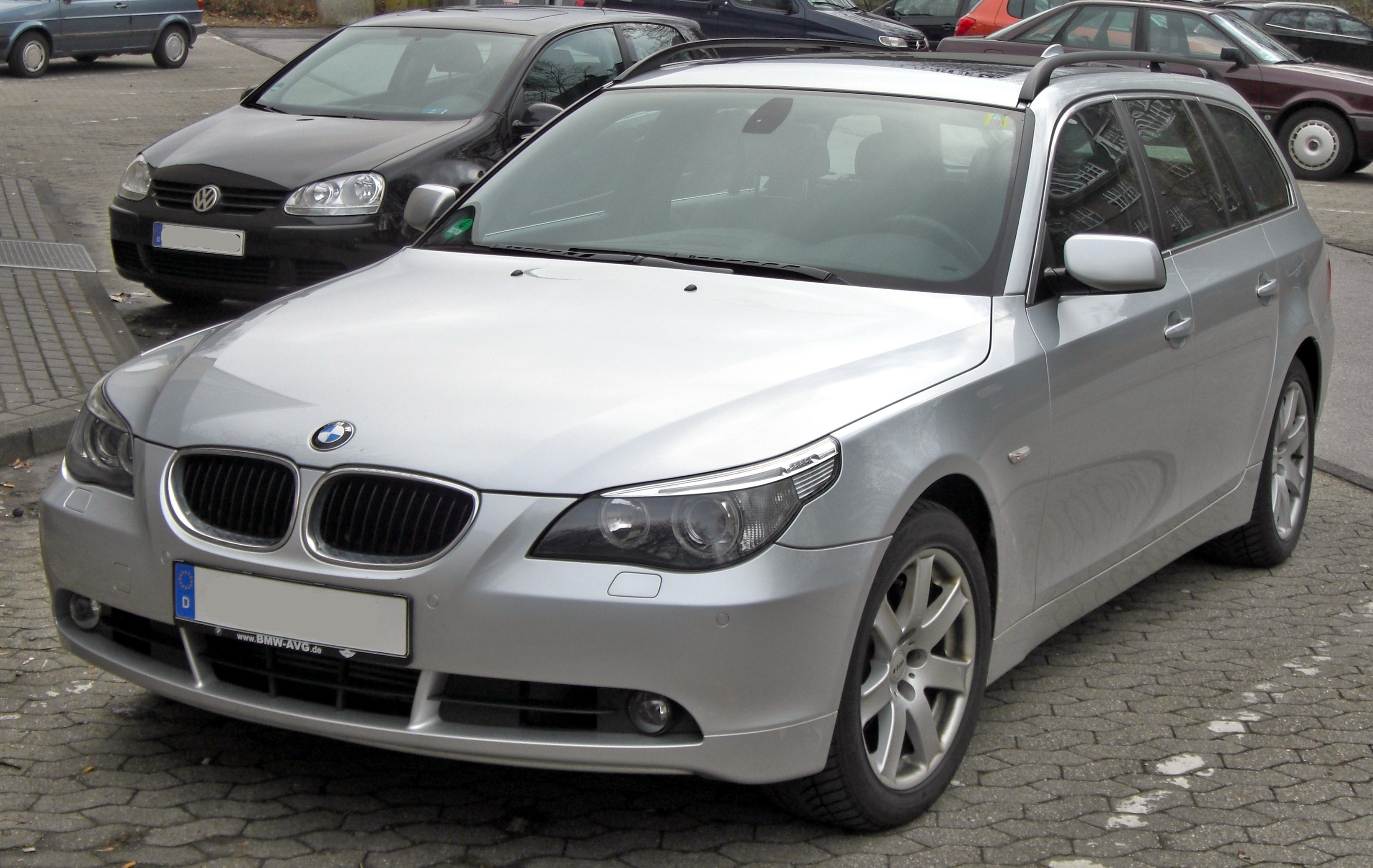 BMW 5er Touring